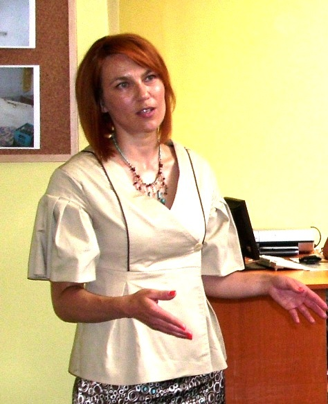 Biliana Raeva in Popovo (Bulgaria) - 04.08.2008